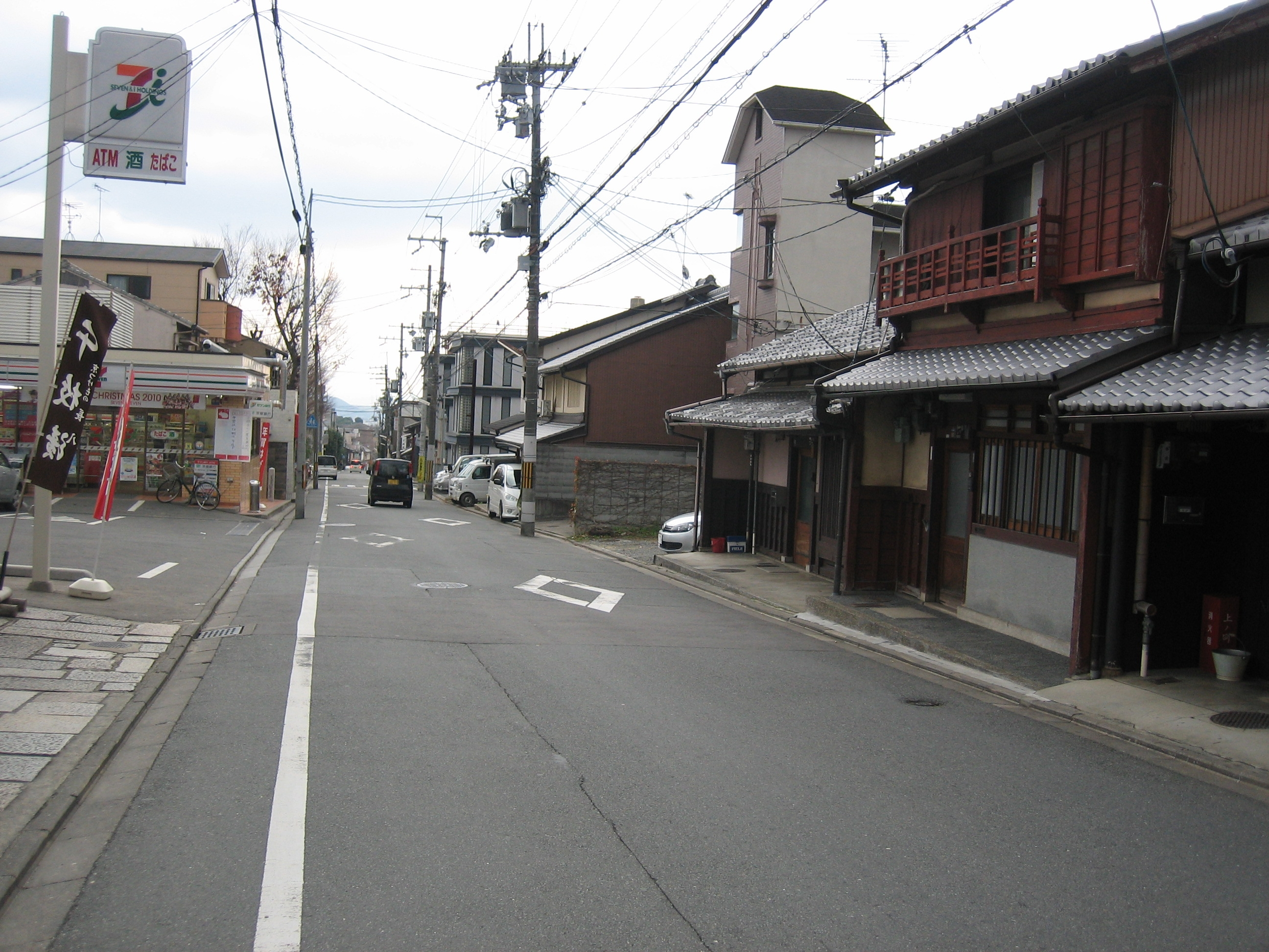 鷹峯街道を京都市北区鷹峯藤林町から撮影